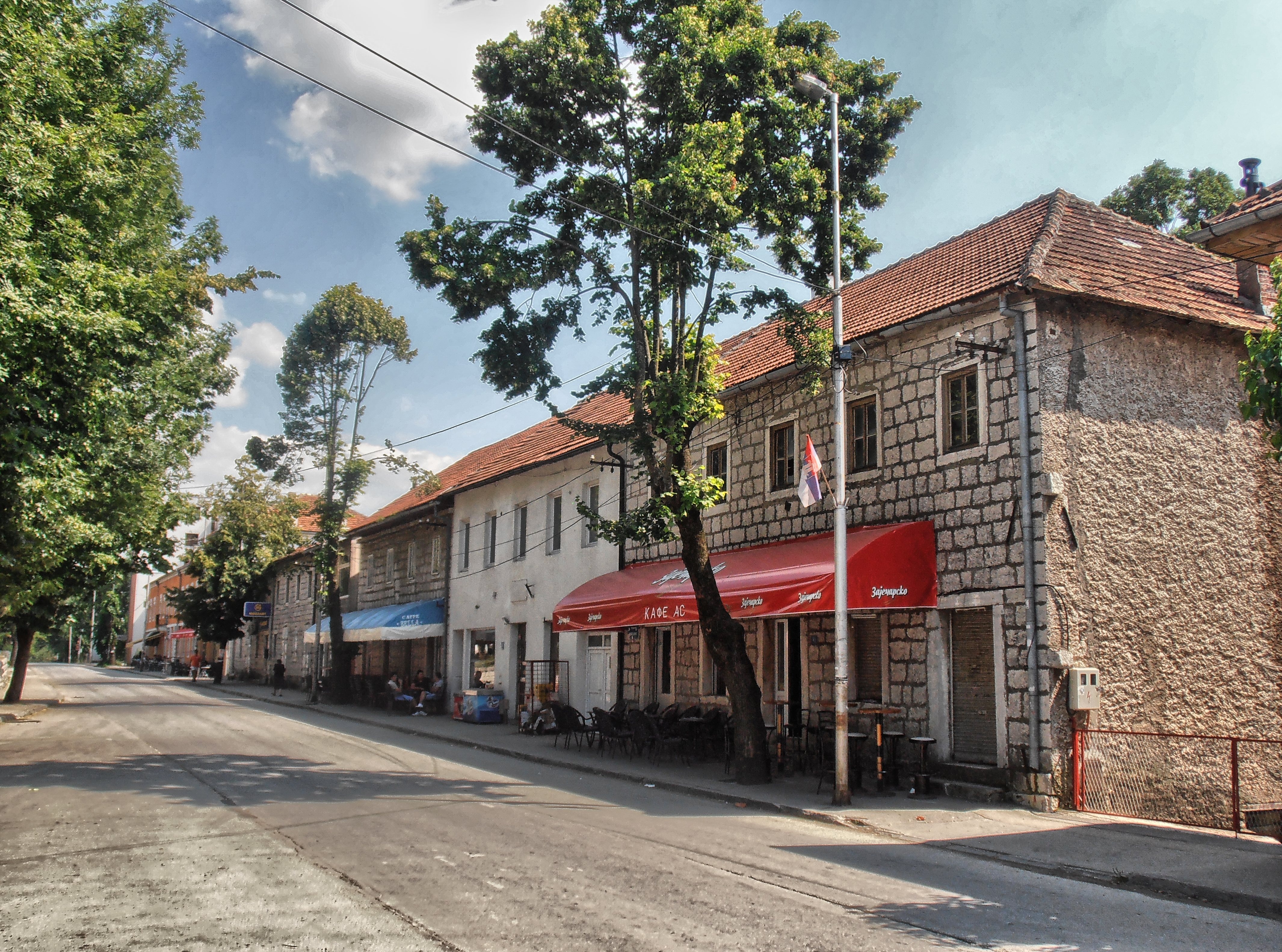 NKD338 NKD339 NKD340 NKD3341 NKD342 NKD343 NKD344 Dio Nemnajine ulice u Gacku